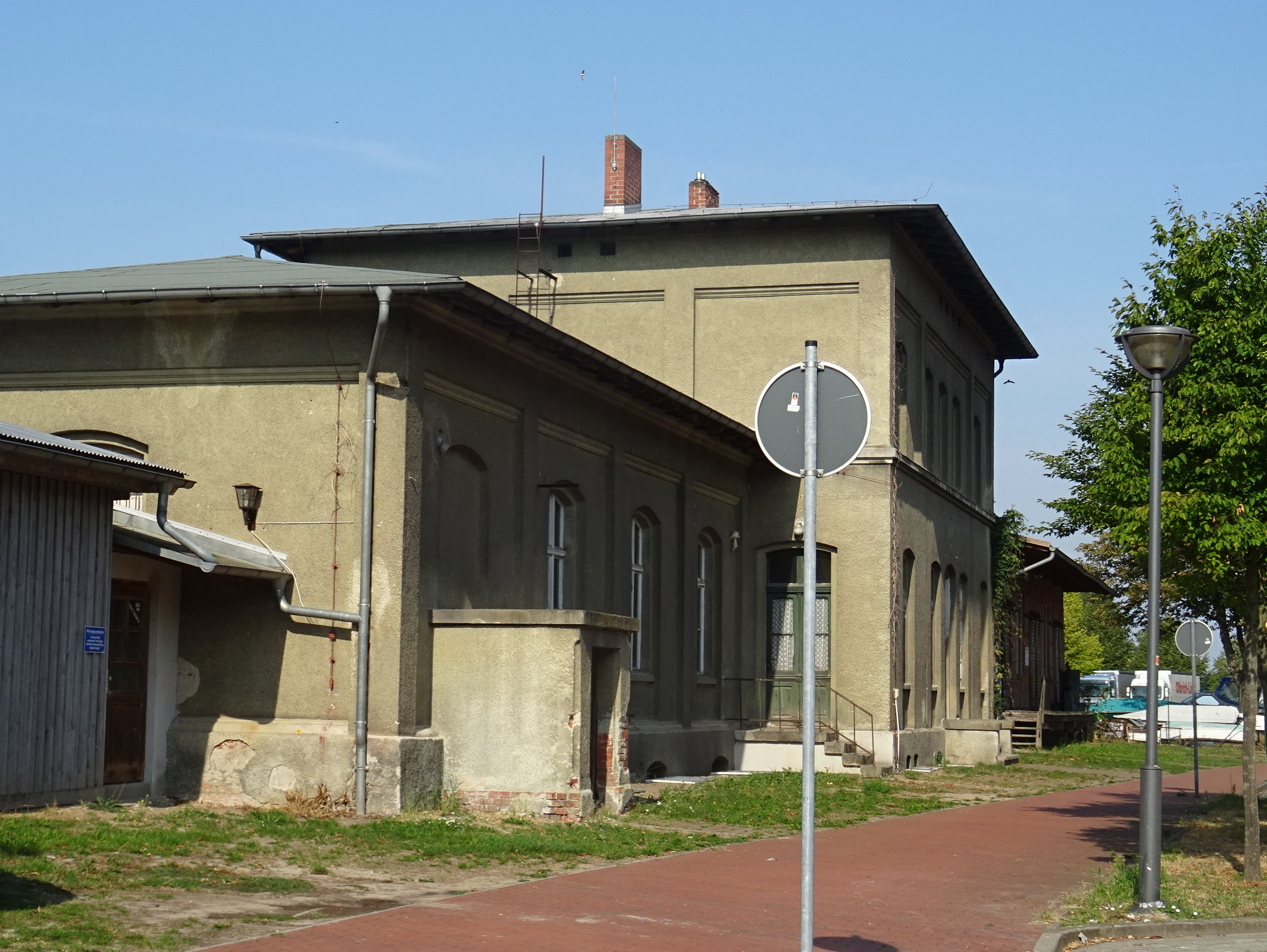 Bahnhof Havelberg, Empfangsgebäude, Straßenseite